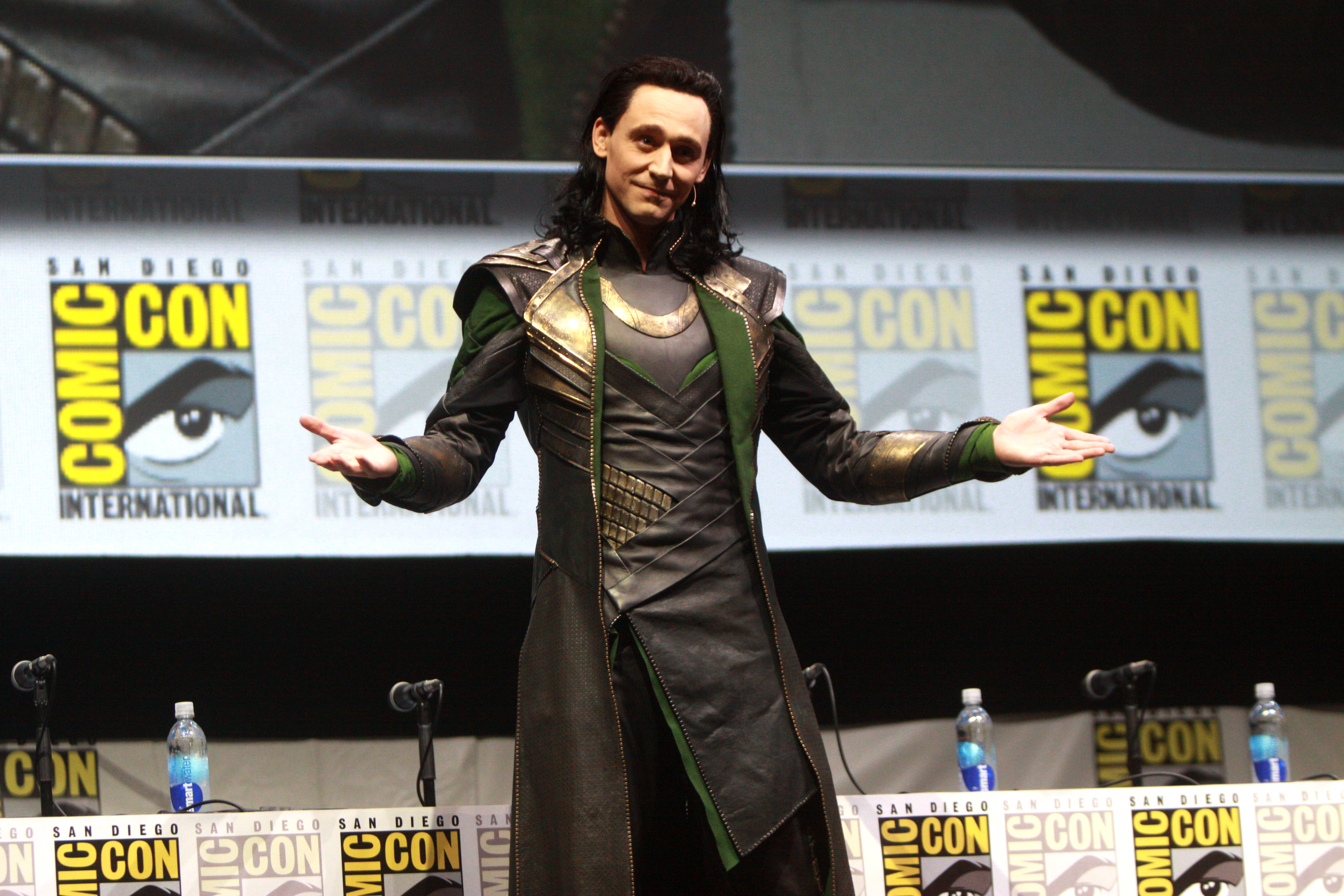 Том Хиддлстон в костюме Локи